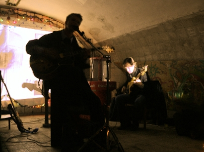 Kaukázus-fellépés egy budapesti squat foglaltházban